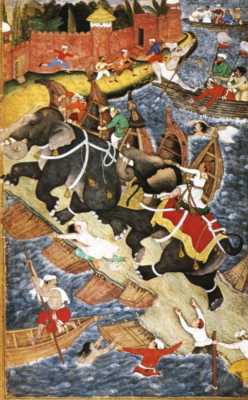 Akbar domina Hawa'i (1590), de Basawan, Victoria and Albert Museum, Londres.